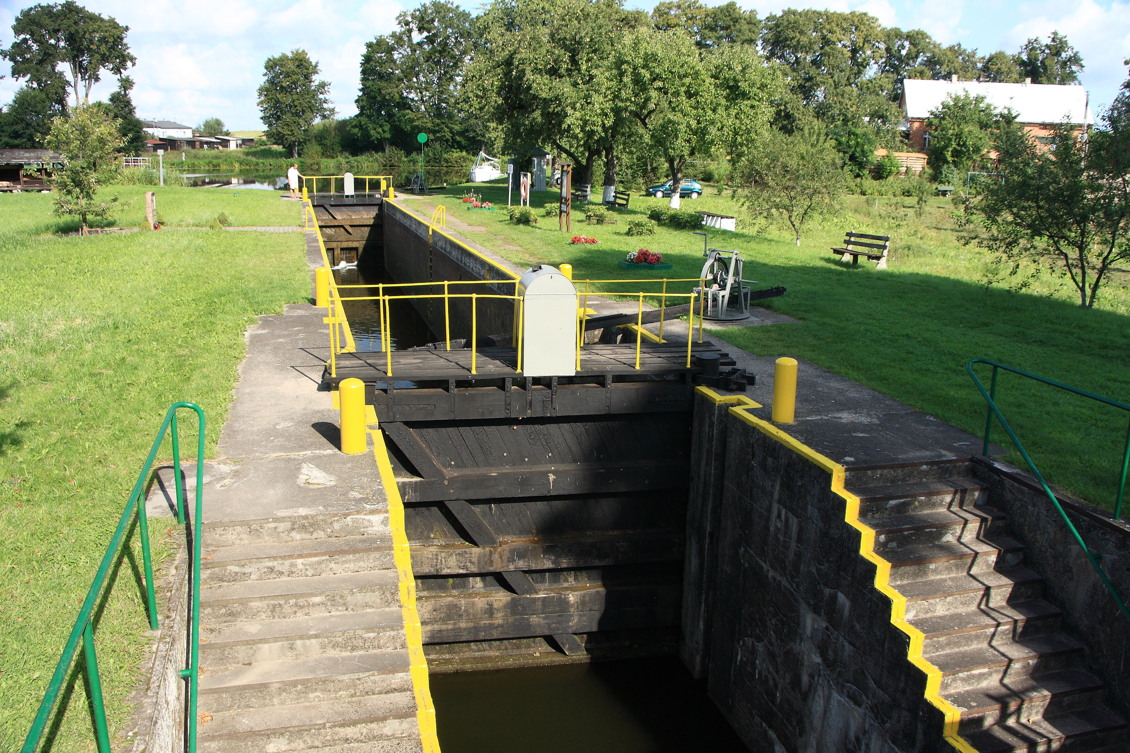 Śluza Miłomłyn w zespole Kanału Elbląskiego